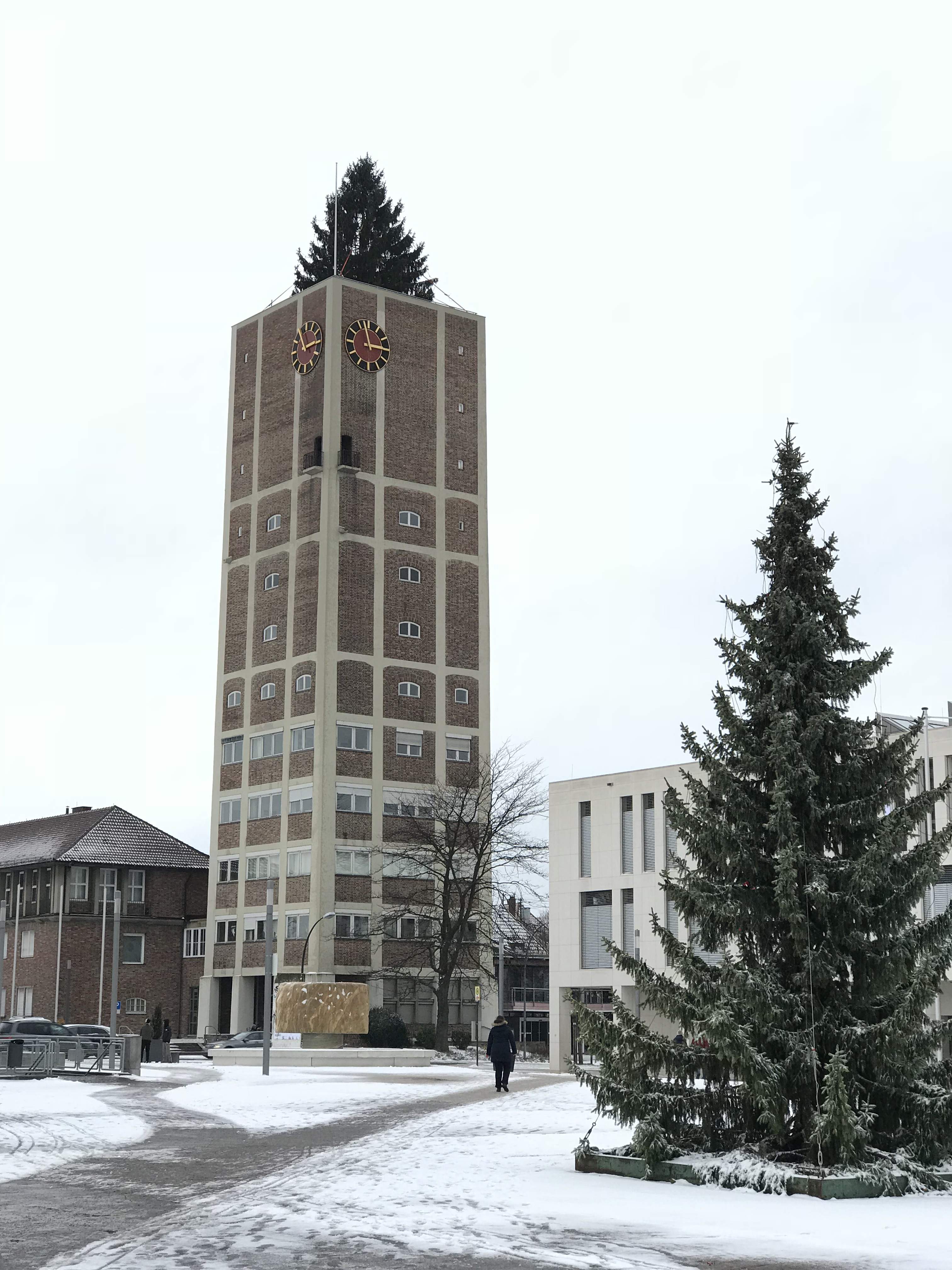 Rathaus Kornwestheim Weihnachtsbaum